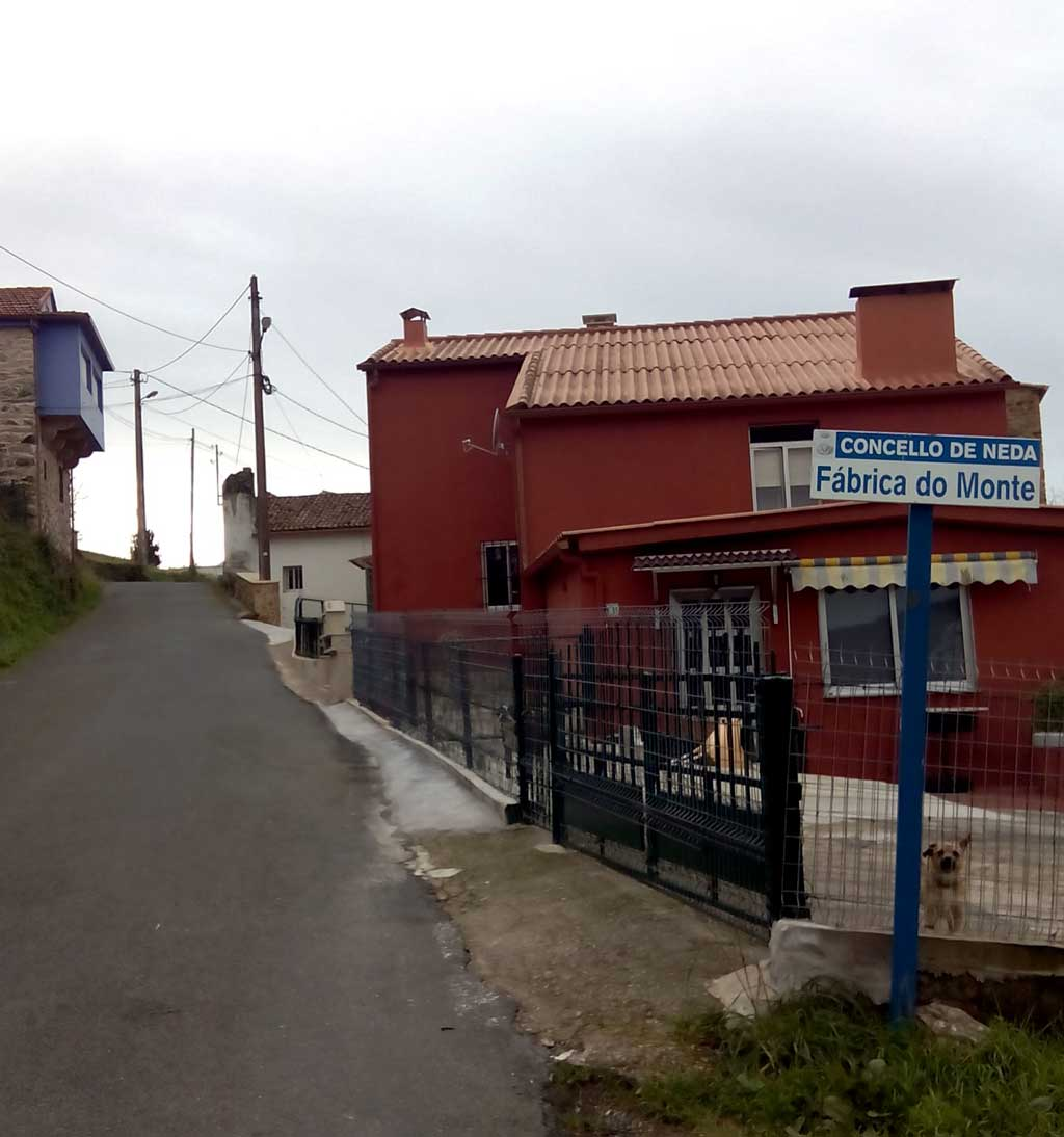 Acceso a Fábrica do Monte, Neda.